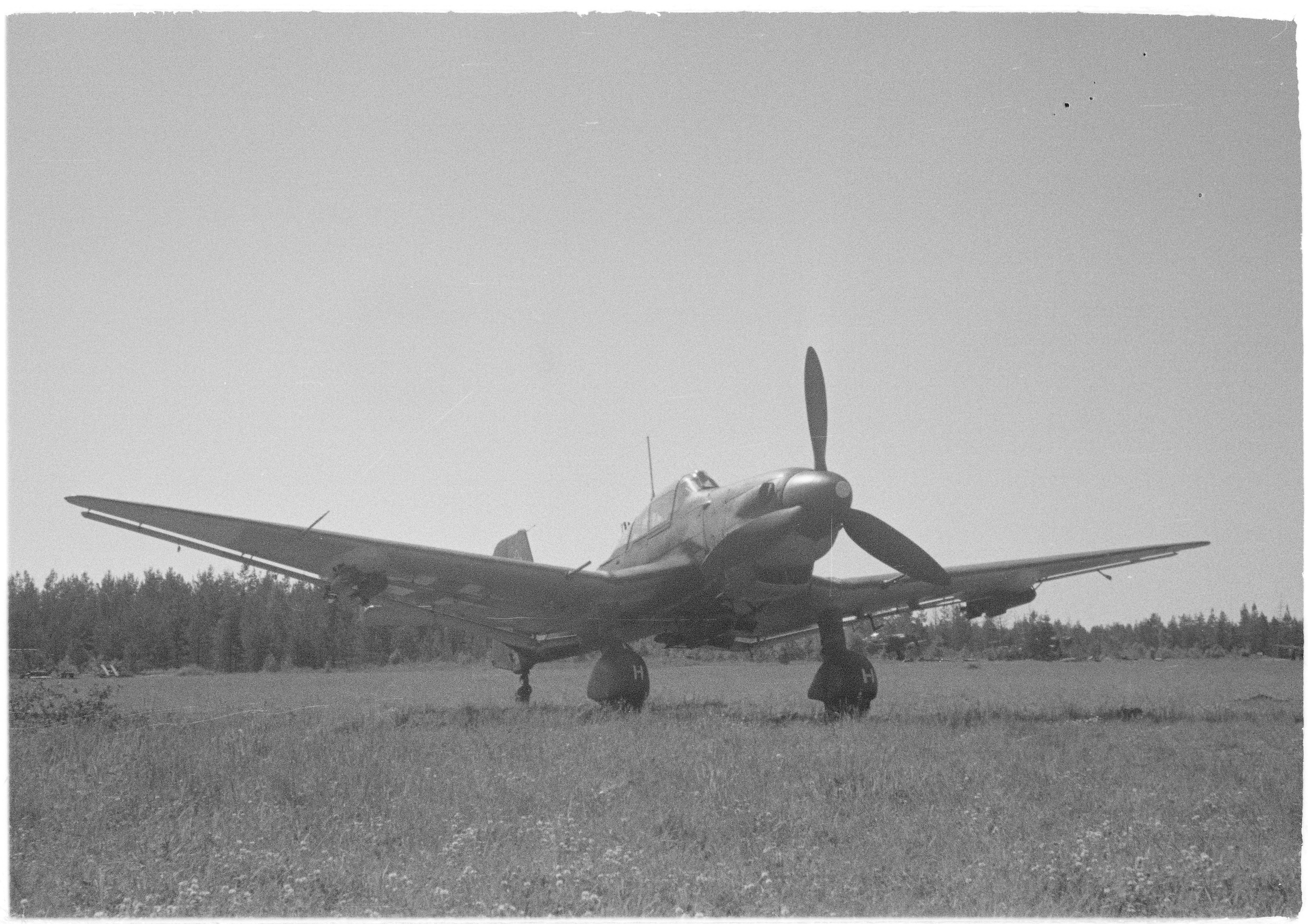 Stuka-syöksypommittaja. (Kuvassa on saksalaisen 1./SG 3:n Junkers Ju 87 D-5, tunnus S7+HH). Kuvauspaikka: Immolan lentokenttä